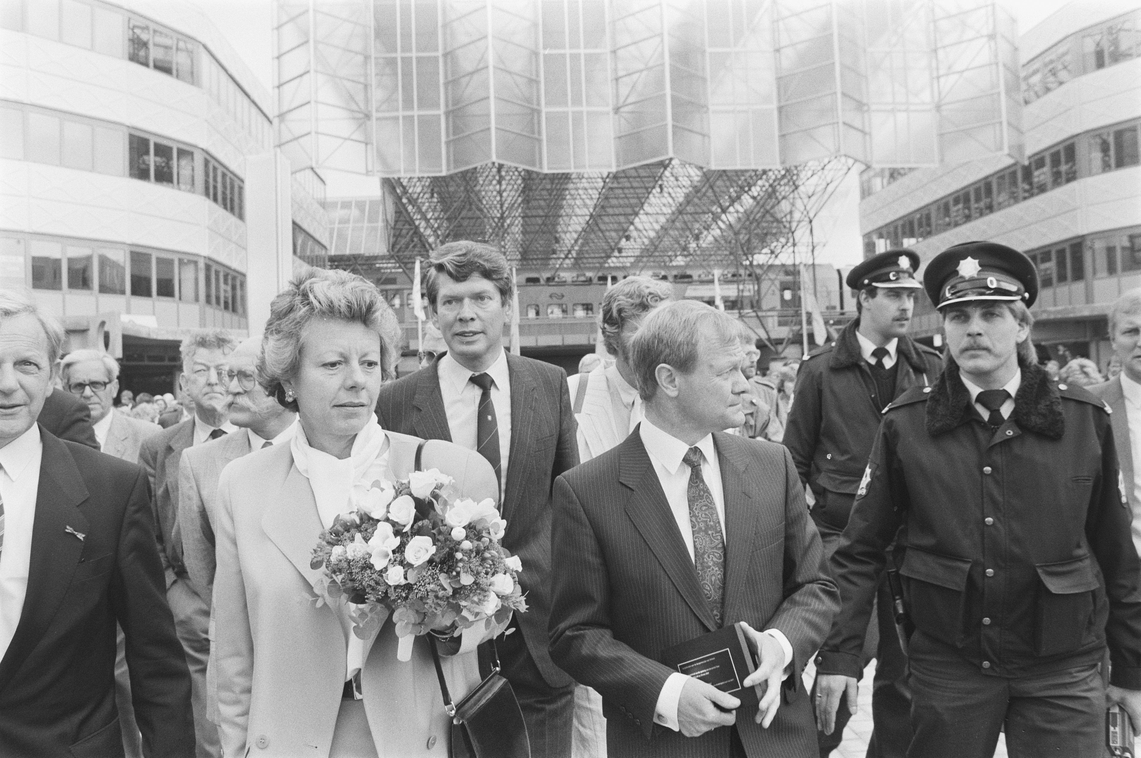 Collectie / Archief : Fotocollectie Anefo Reportage / Serie : [ onbekend ] Beschrijving : Officiele opening Flevolijn traject Weesp-Almere; v.l.n. Ploeger (pres-dir. NS), minister Smit-Kroes (V&W), burgemeeste de Cloe van Almere op CS Almere Datum : 29 mei 1987 Locatie : Almere, Weesp Trefwoorden : burgemeester, directeuren, ministers, openingen, spoorwegen Persoonsnaam : Cloe De, Smit-Kroes, Neelie Fotograaf : Molendijk, Bart / Anefo Auteursrechthebbende : Nationaal Archief Materiaalsoort : Negatief (zwart/wit) Nummer archiefinventaris : bekijk toegang 2.24.01.05 Bestanddeelnummer : 933-9959